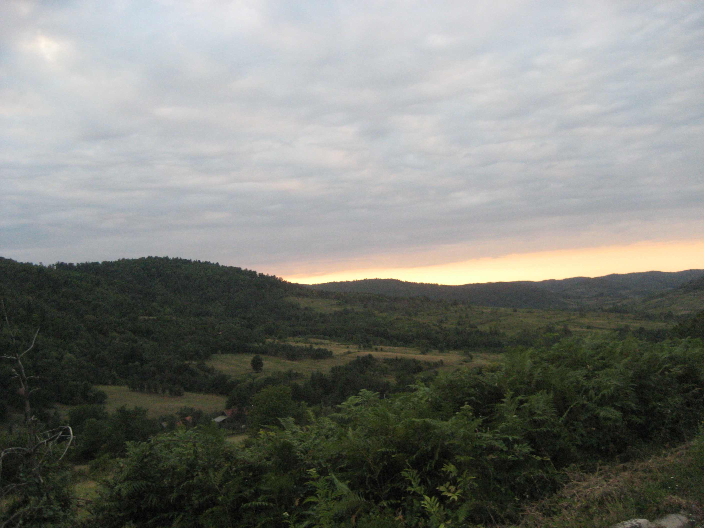 Pohoří Zrinska Gora v Chorvatsku